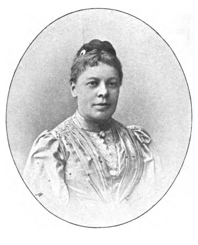 Angelika von Hörmann. In: Auf stillen Wegen: Neue Gedichte. München: Lindauer